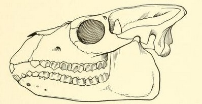 Skull of Thoatherium